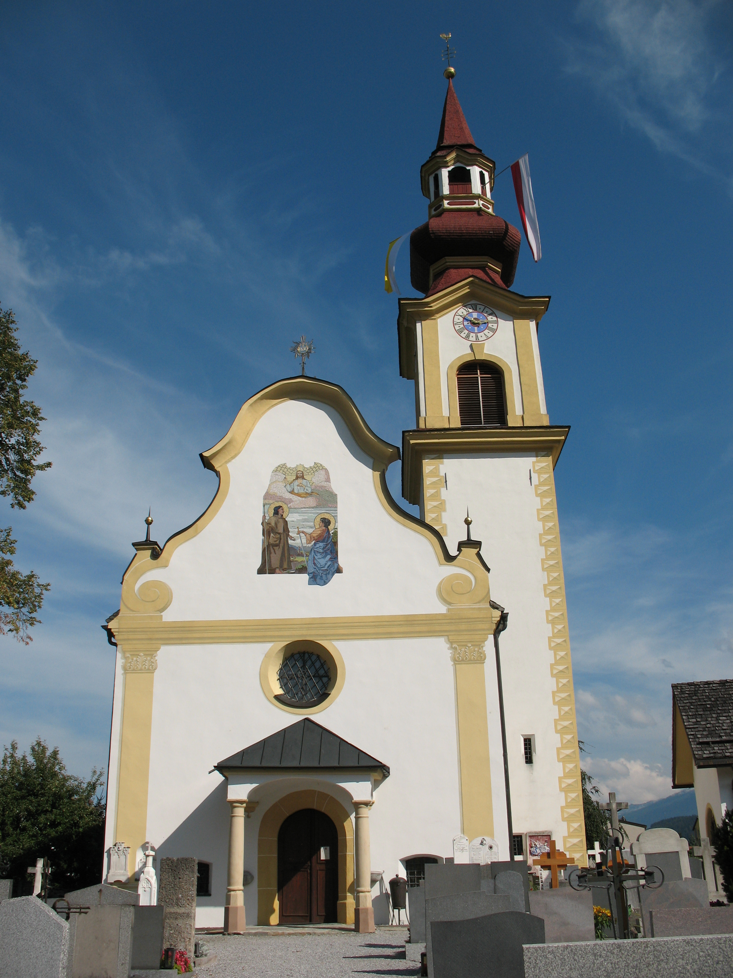 Alte Pfarrkirche hll. Jodok und Lucia mit Friedhof